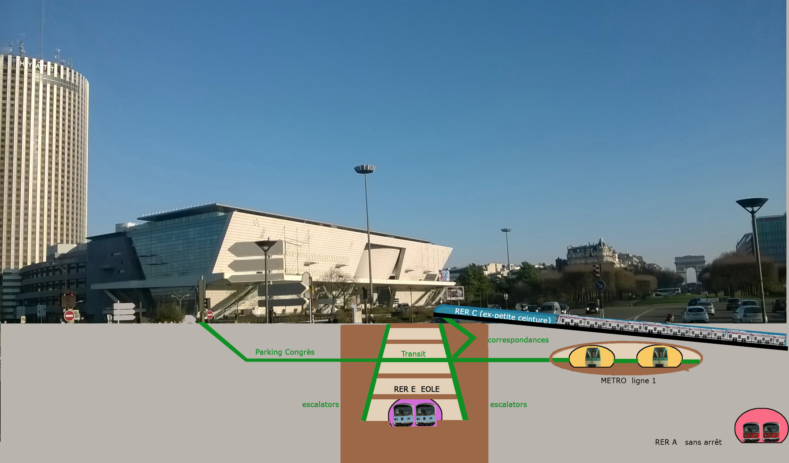 Projet d'extension de la gare de Neuilly - Porte Maillot. Vue transversale du projet de gare RER E ÉOLE et de correspondance avec ligne 1 du métro / RER C (ex-Petite Ceinture) et passage du RER A.